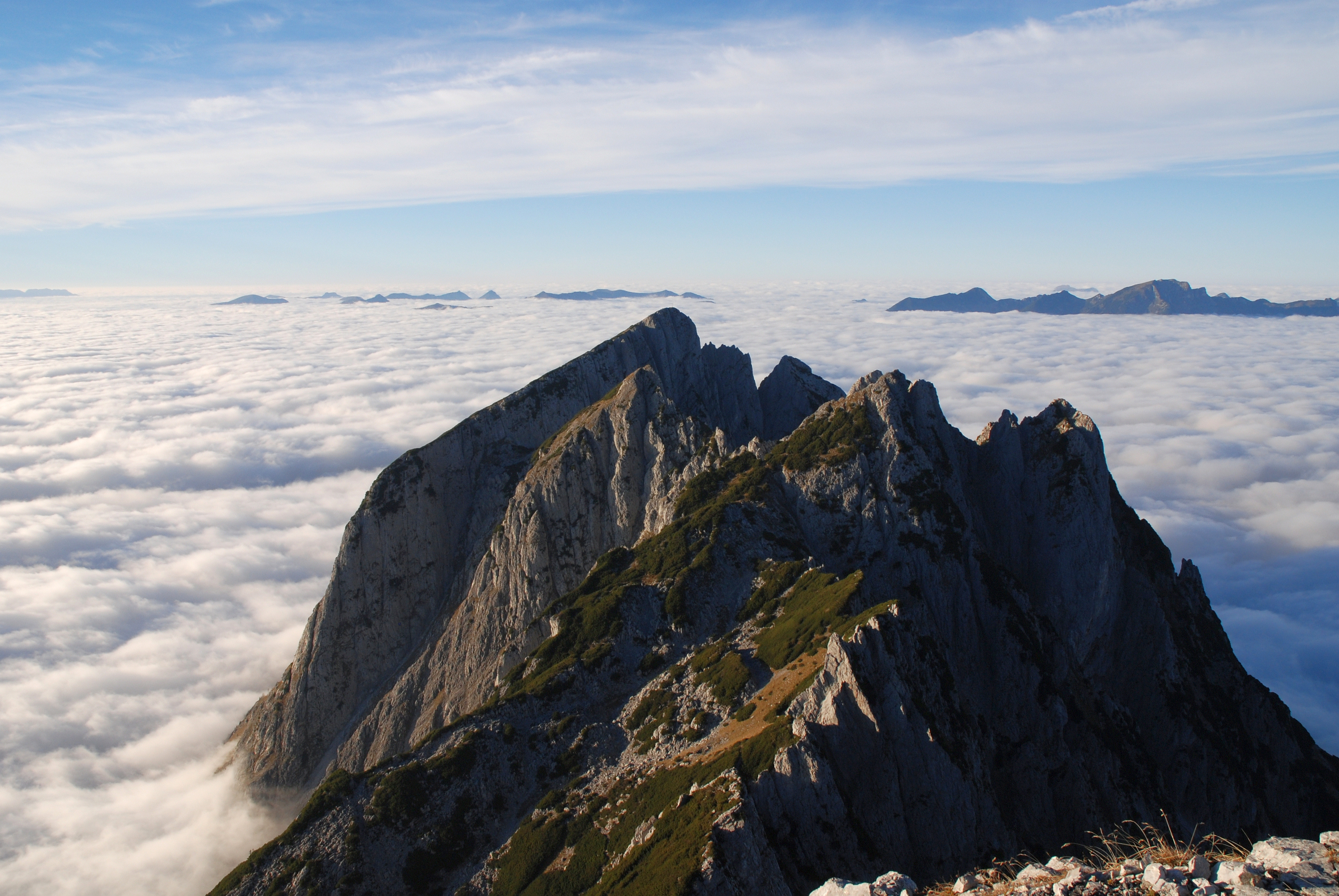 Blick vom Angerstein nach Norden zum Großen Donnerkogel, Gosaukamm, Österreich